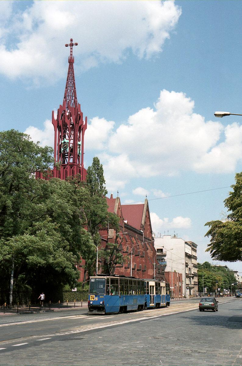 Kościół św. Elżbiety Węgierskiej i ulica Grabiszyńska przed przebudową.